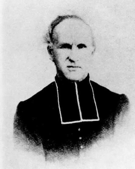 Juan Martin Hiribarren est un écrivain labourdin de langue basque né en 1810 à Ascain et mort en 1866 à Bayonne